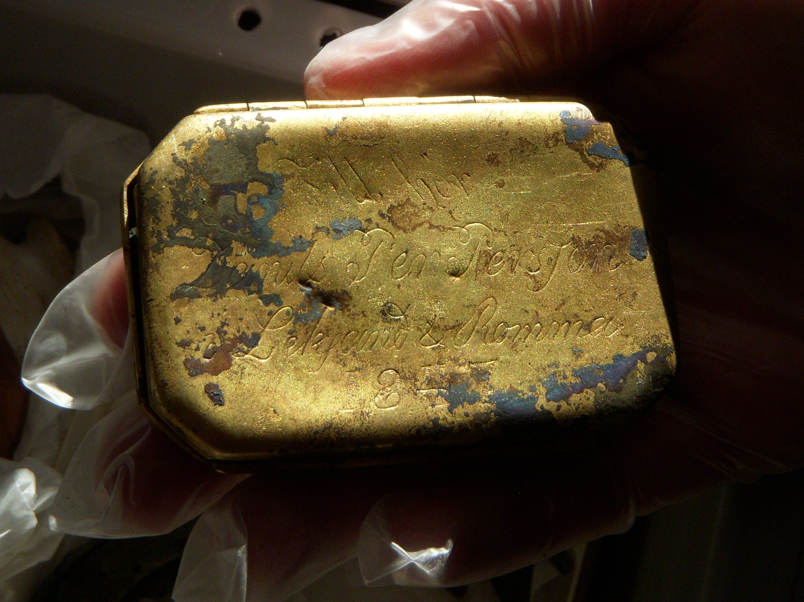 Arkeologiska utgrävningar i samband med Citybanan på Riddarholmen, snusdosa med inskription "Danils Per Persson Leksand & Romma 1847".